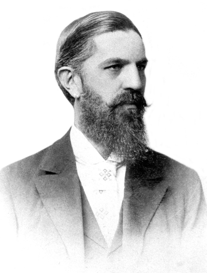 Олександр Барвінський.: Олександр Барвінський відомий український громадсько-політичний діяч в Галичині.